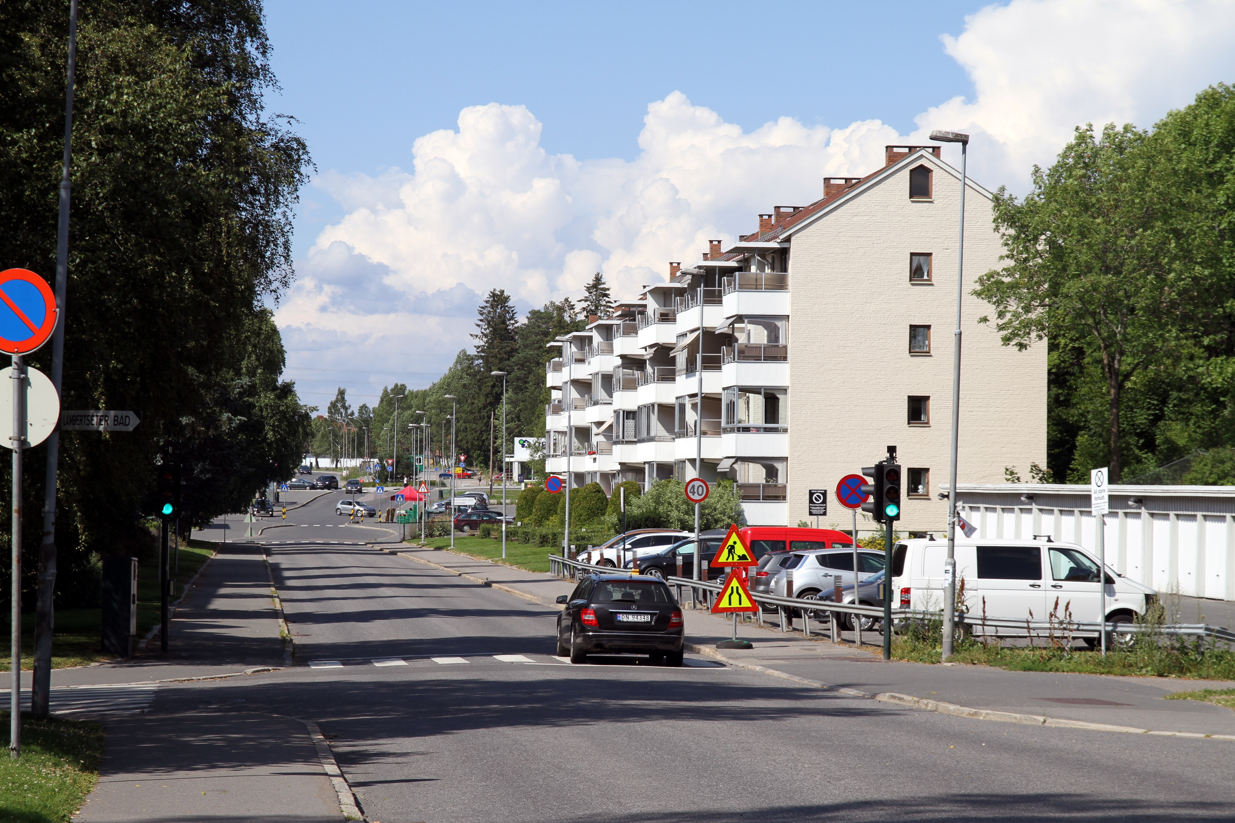 Langbølgen i Oslo.